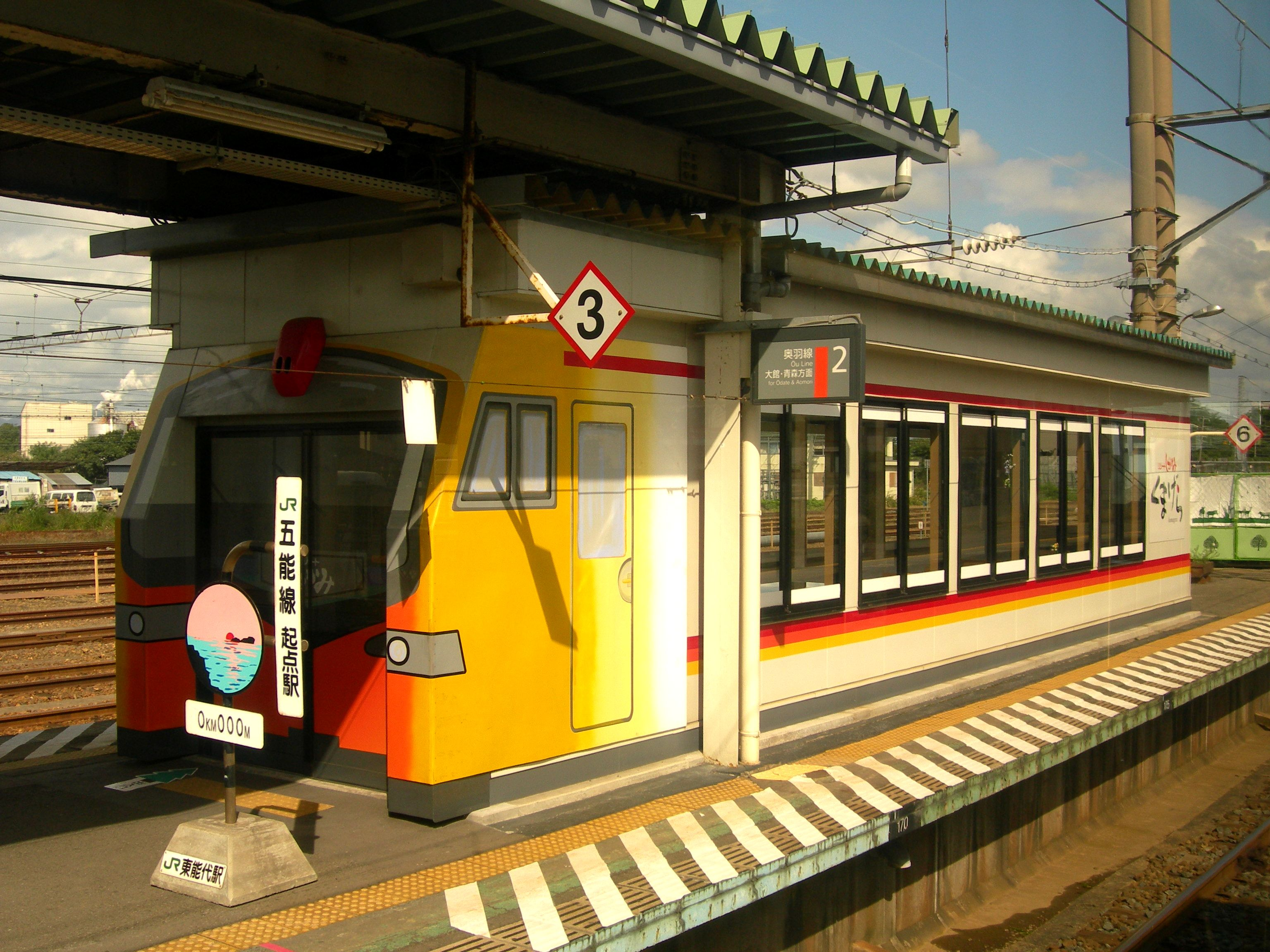 東能代駅ホームにある待合室